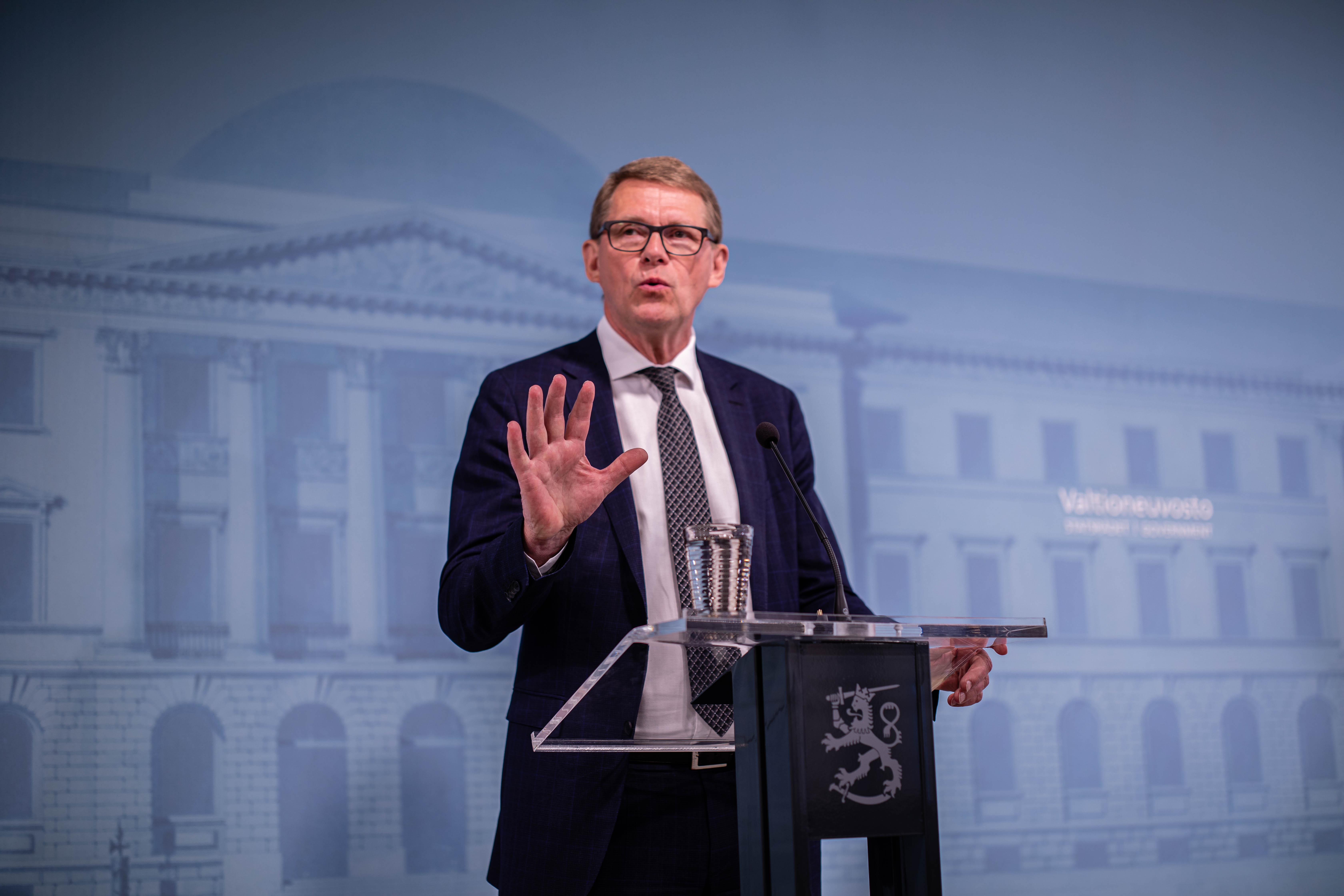 © Jussi Toivanen / valtioneuvoston kanslia Tasavallan presidentti nimitti tiistaina 9. kesäkuuta valtiotieteen maisteri, kansanedustaja Matti Vanhasen valtioneuvoston jäseneksi ja valtiovarainministeriksi. Samalla presidentti vapautti pyynnöstä yhteiskuntatieteiden maisteri, kansanedustaja Katri Kulmunin valtiovarainministerin tehtävästä ja valtioneuvoston jäsenyydestä.